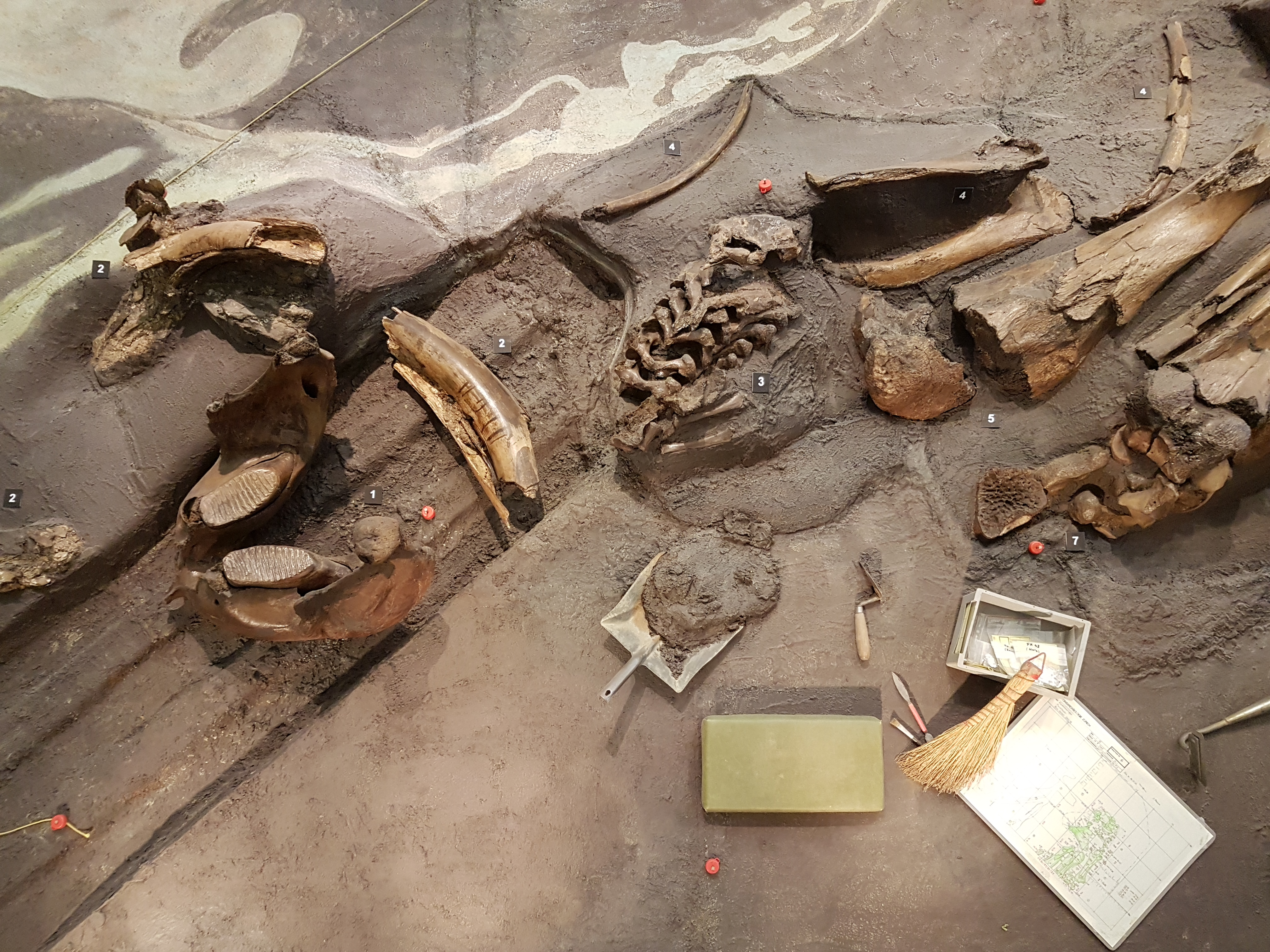 Mammutmusem in Niederweningen (Switzerland)